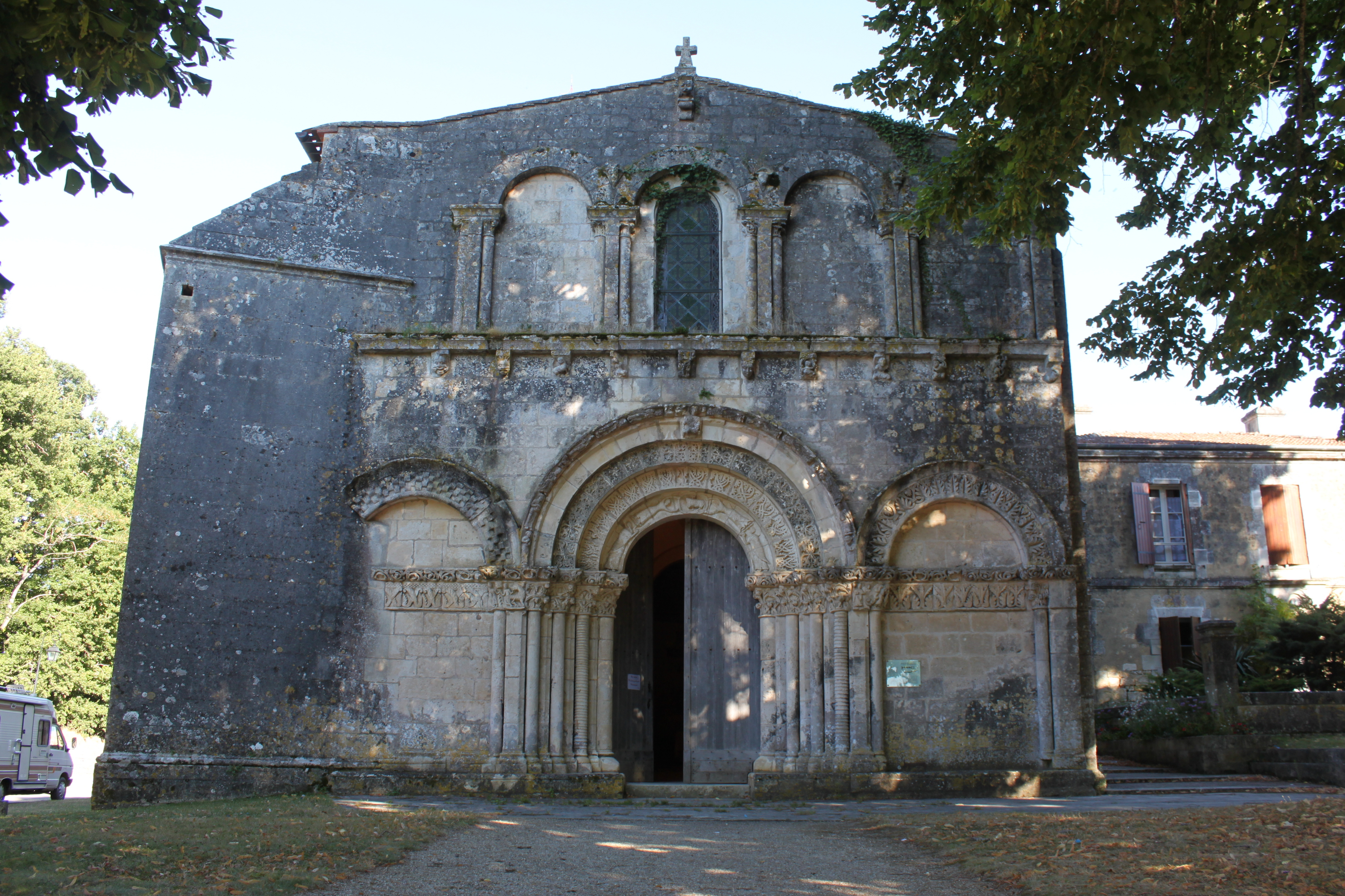 Église Saint-Martial, Fr-17-le Douhet.